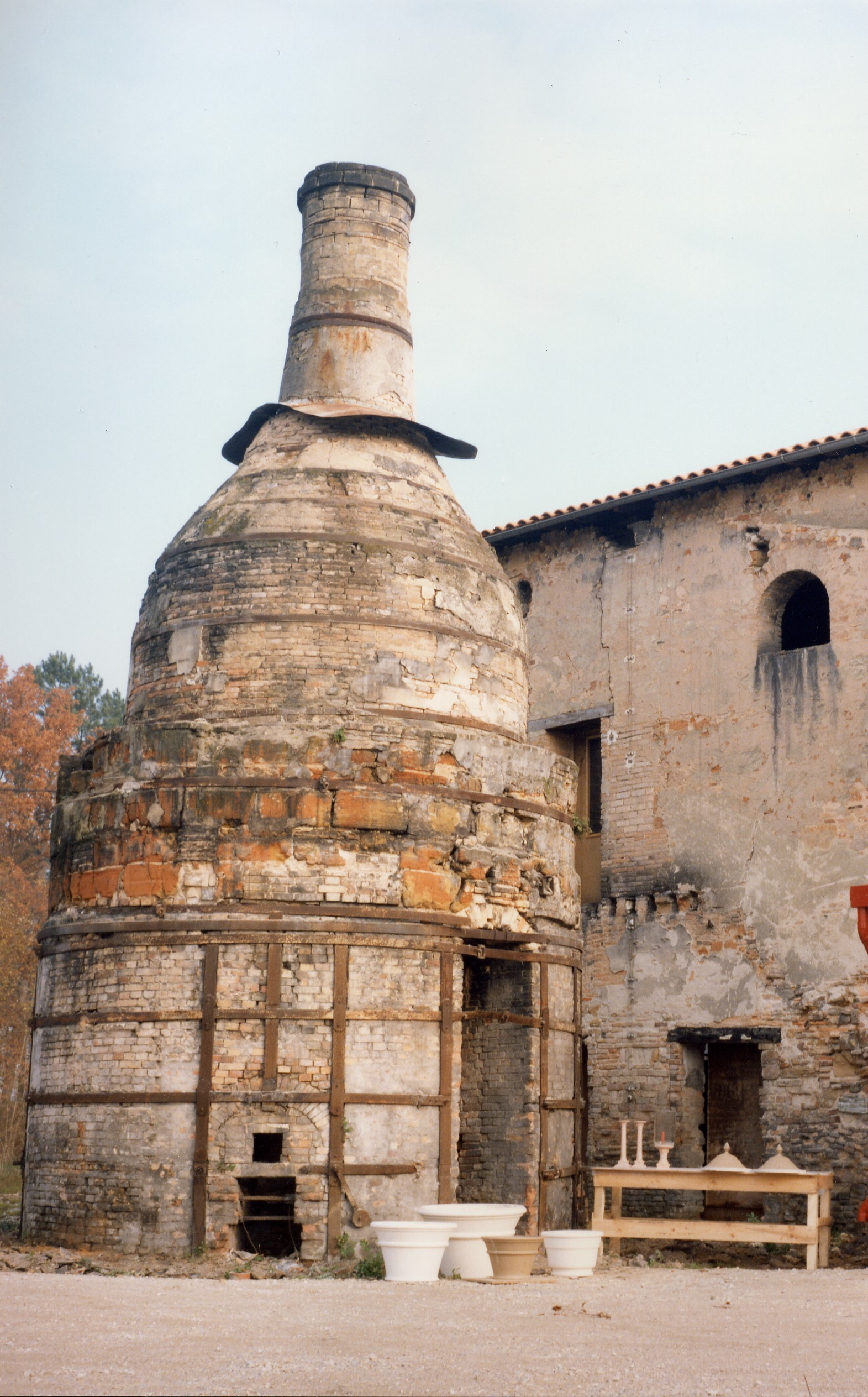 Au début des années 50, la poterie ferme ses portes. Rachetée en 1982 par la commune, elle accueille aujourd'hui l'association « terre d'art et d'argile ».